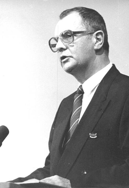 ADN-ZB-Senft-9.11.88-mx-Berlin: Gedenkveranstaltung - Auf der Gedenkveranstaltung des Verbandes der Jüdischen Gemeinden in der DDR im Deutschen Theater anläßlich des 50. Jahrestages des faschistischen Pogroms nahm der Vizepräsident des Verbandes und Vorsitzende der Jüdischen Gemeinde Berlin, Dr. Peter Kirchner, das Wort.